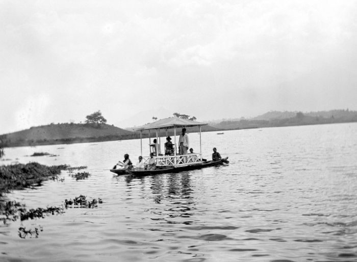 Negatief. een rondvaart paruw op het meer "Sitoe Bagendit" bij Garoet, West-Java.